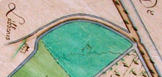 Fragment van een pre-kadastrale kaart, zodanig geroteerd dat het noorden boven is. Rechts is een stukje Croeselaan zichtbaar, links de hoeve Lubbenes. Het gebied in het kaartfragment omvat circa 300 x 150 meter.